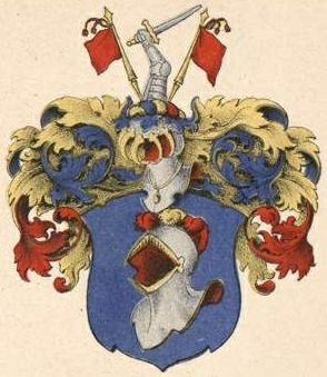 Grotenhielmi suguvõsa aadlivapp